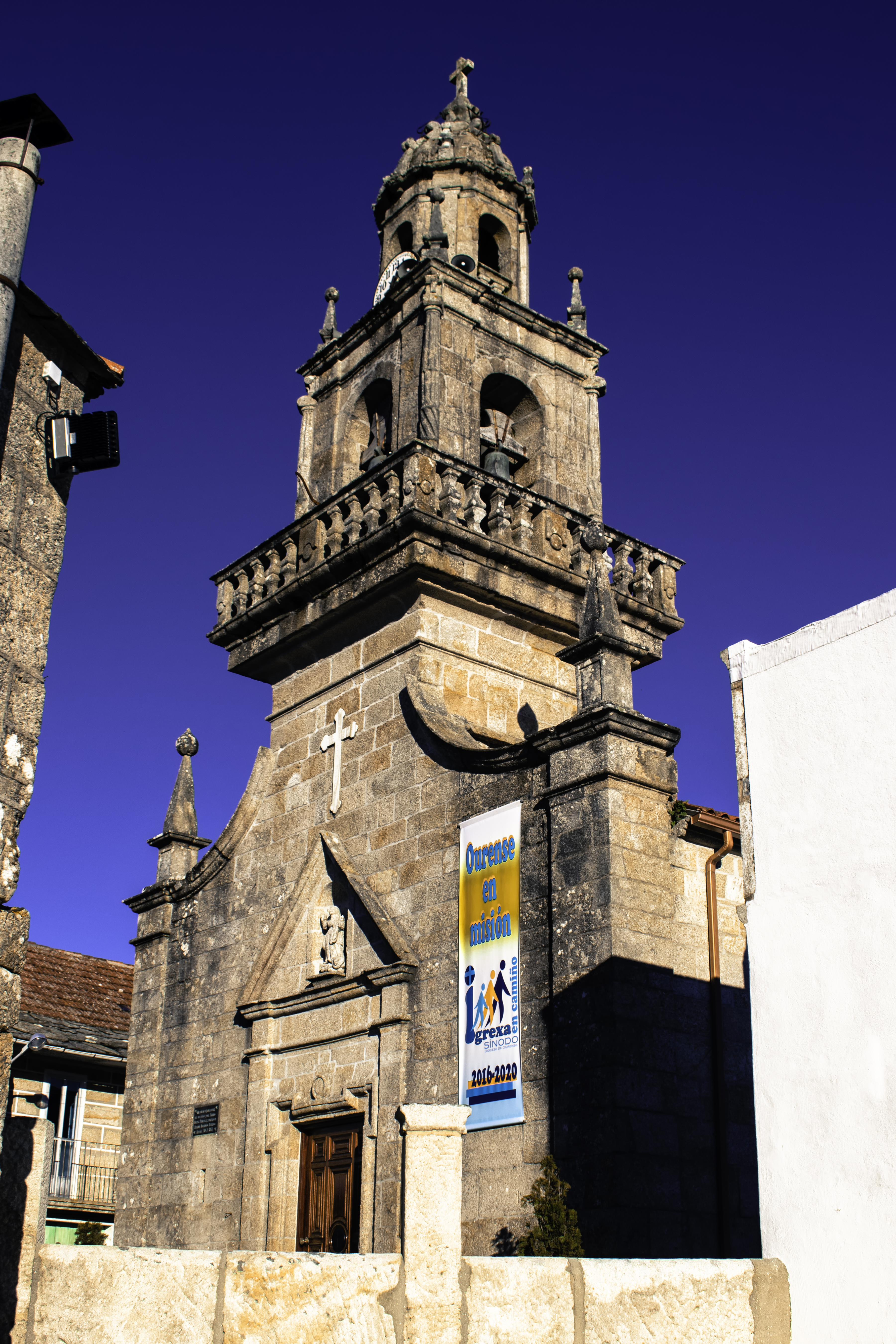 Igrexa de Beariz.